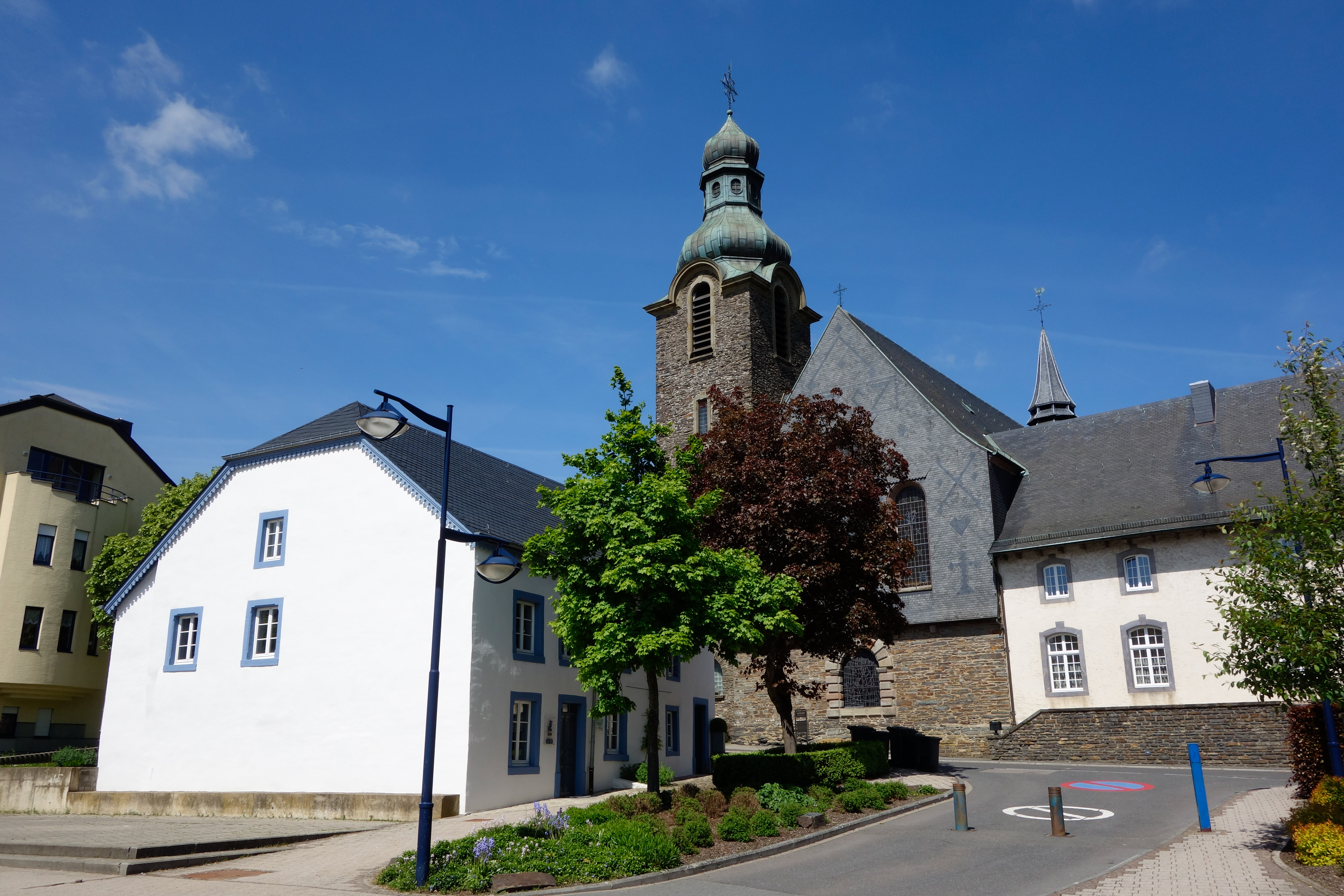 D'Schuddenhaus zu Ëlwen